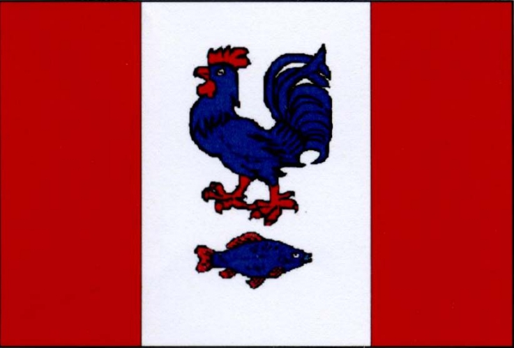 vlajka, Moravičany, okres Šumperk